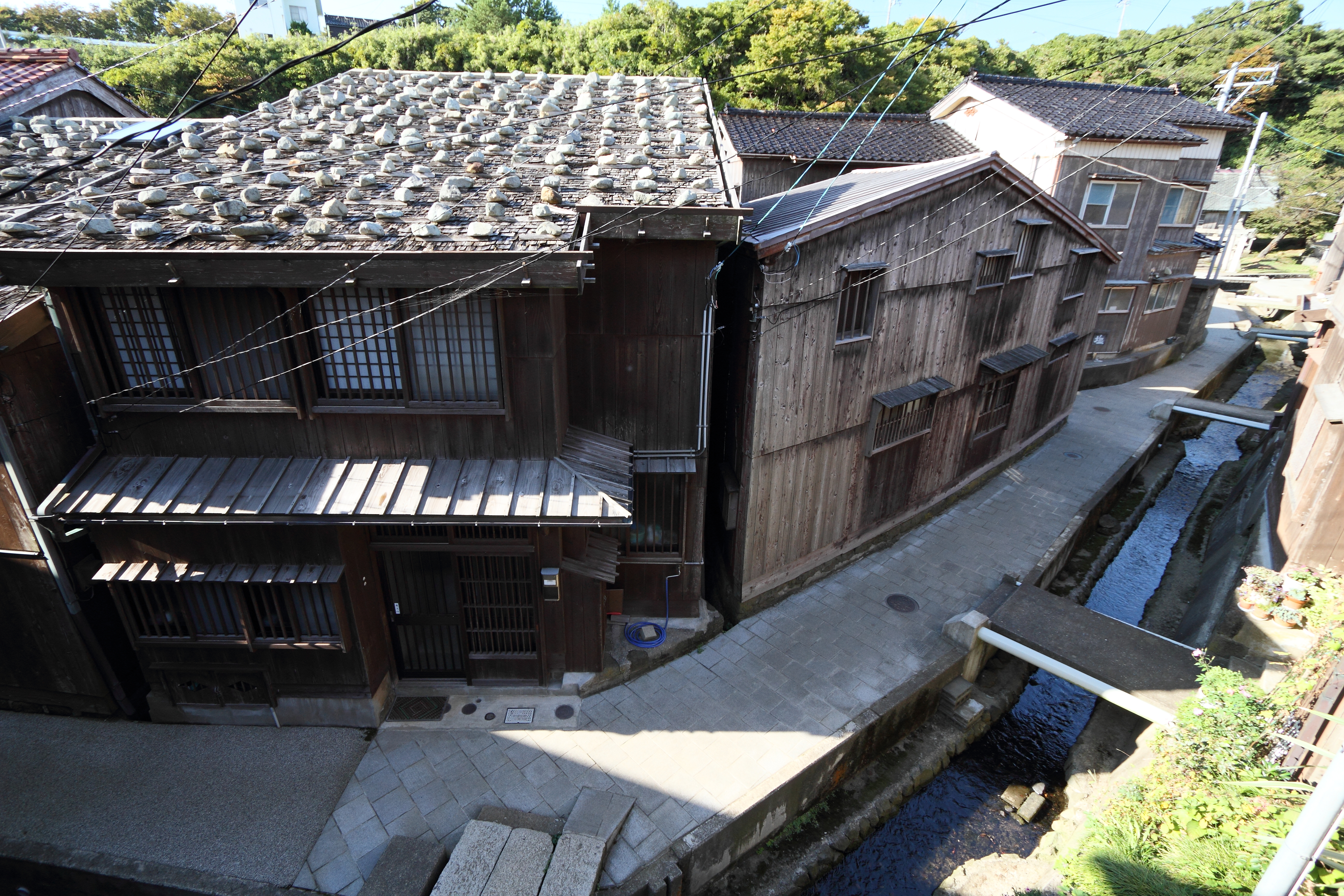 宿根木集落